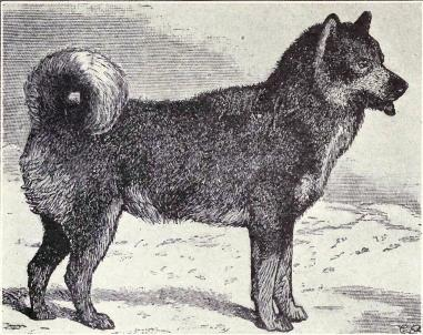 Esquimau from 1915